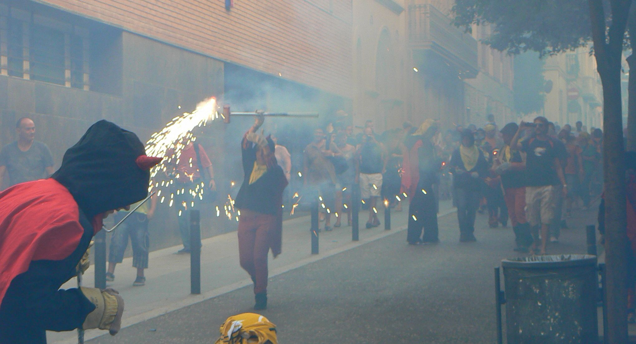 Correfoc infantil a les festes del barri de Gràcia (Barcelona), el 2010